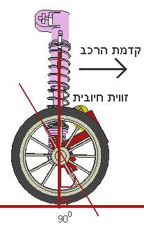 אני יצרתי קובץ זה באמצעות LeaCad